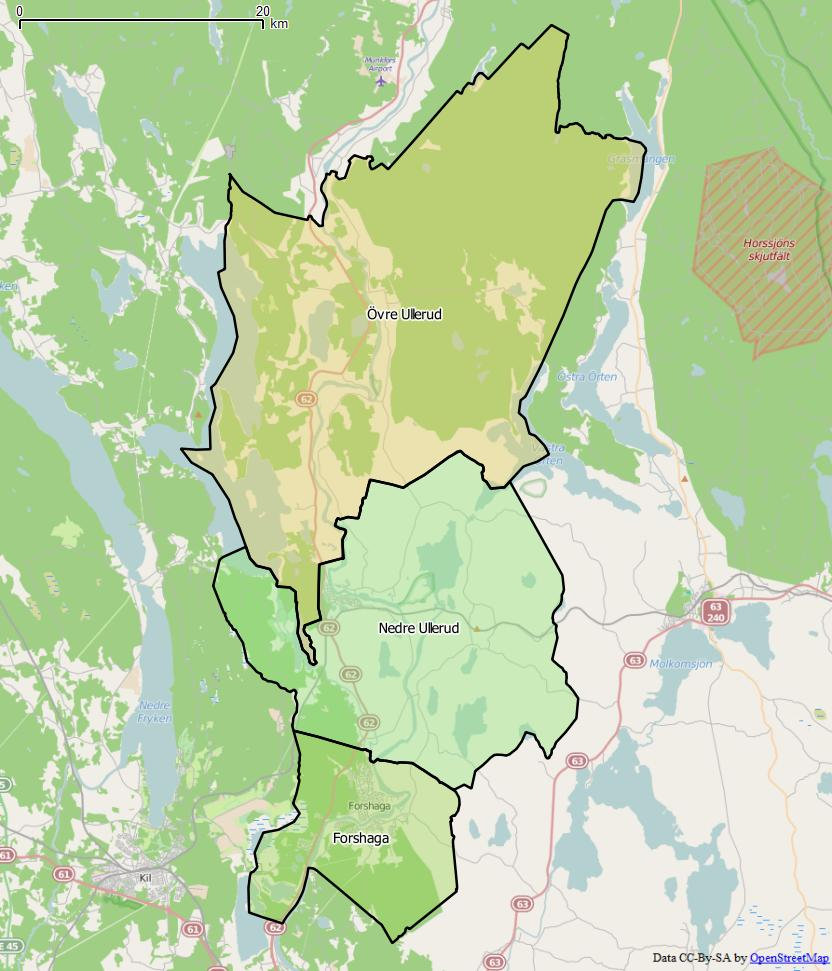 Distriktsindelningen i Forshaga kommun